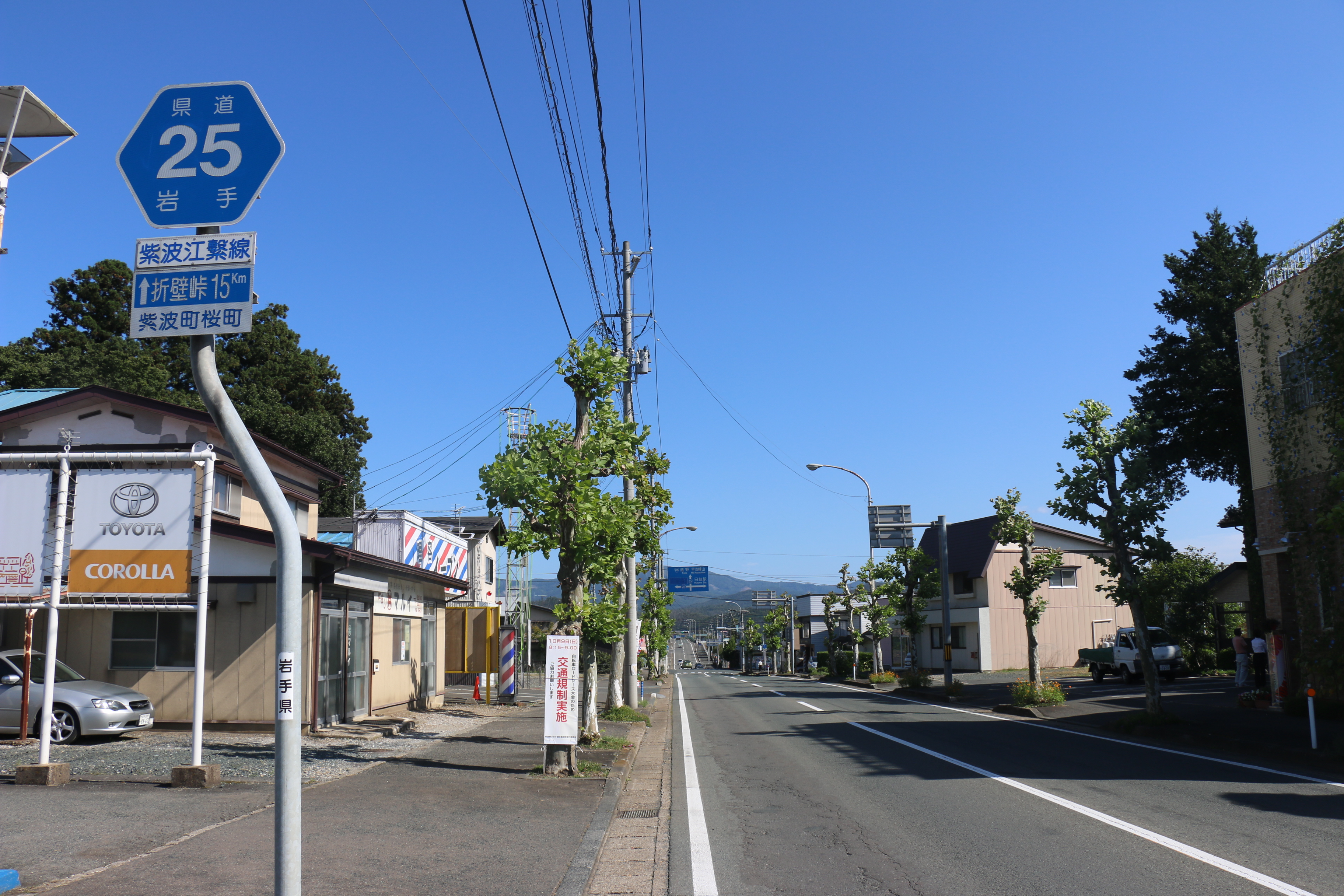 岩手県道25号線 起点（運動公園入口交差点）付近